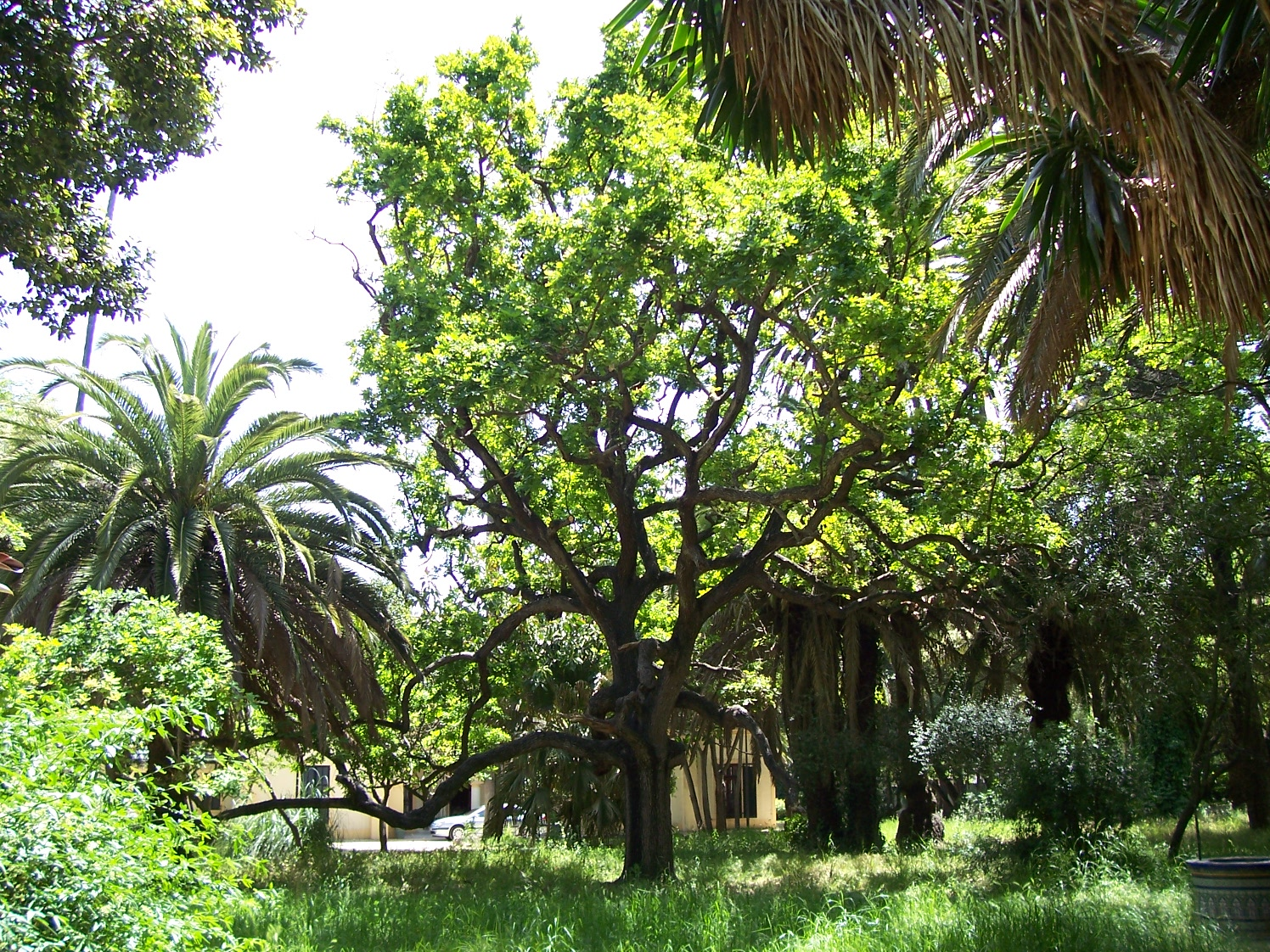 Imagen del parque de las Acacias de Algeciras, gran roble centenario presidiendo el caserón sede de la Mancomunidad de municipios del campo de Gibraltar.